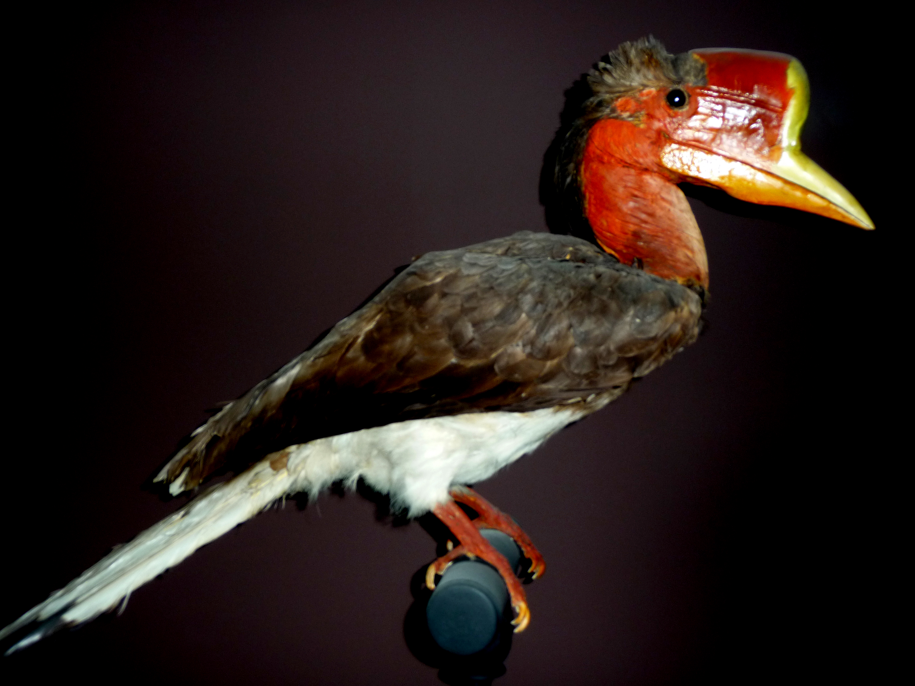 Calao à casque rond naturalisé (Rhinoplax vigil)